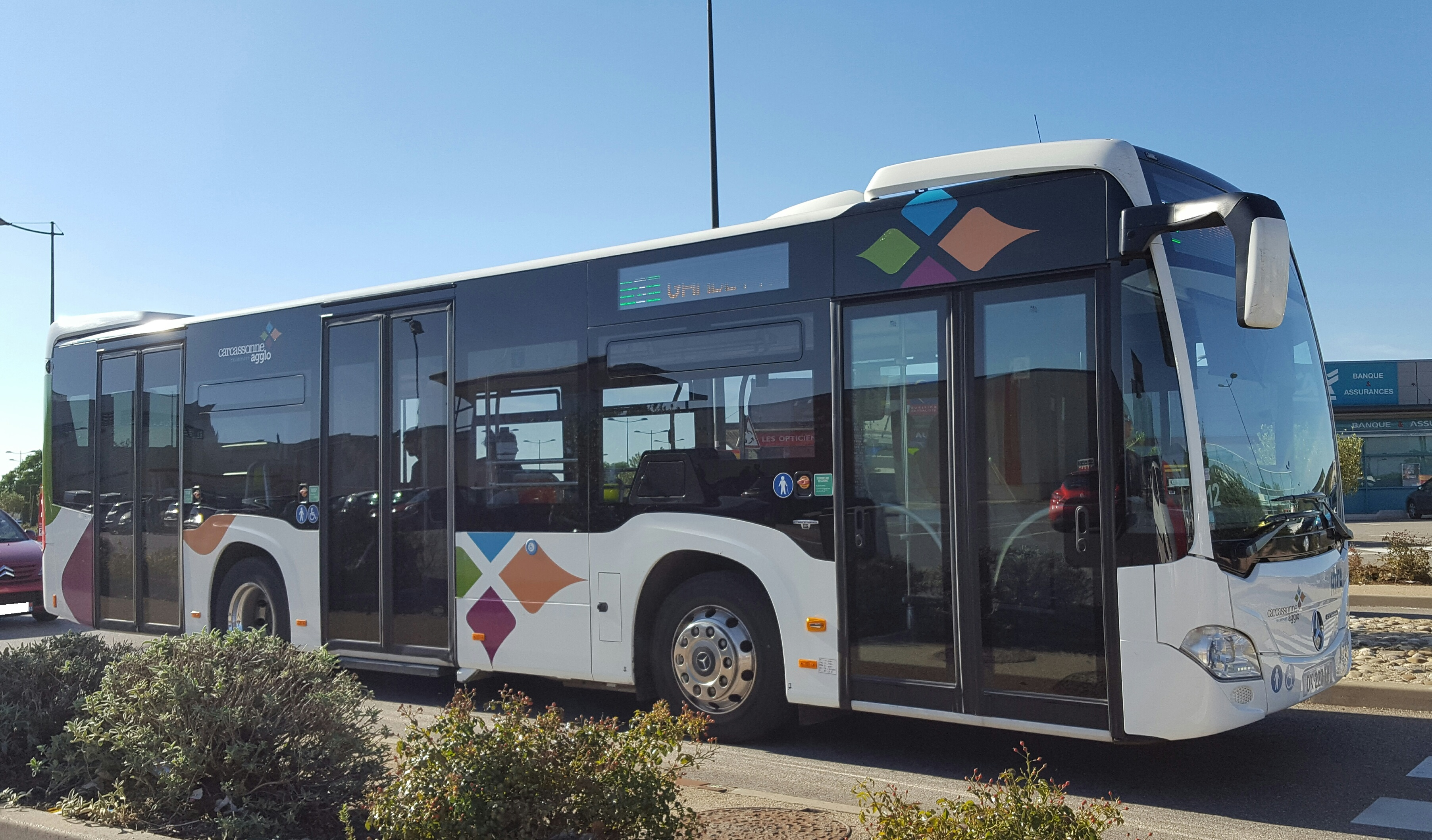 Mercedes Citaro K C2 n°12 du réseau de Carcassonne quittant l'arrêt "Z.A. Pont Rouge" sur la ligne 3 à destination de "Gambetta"